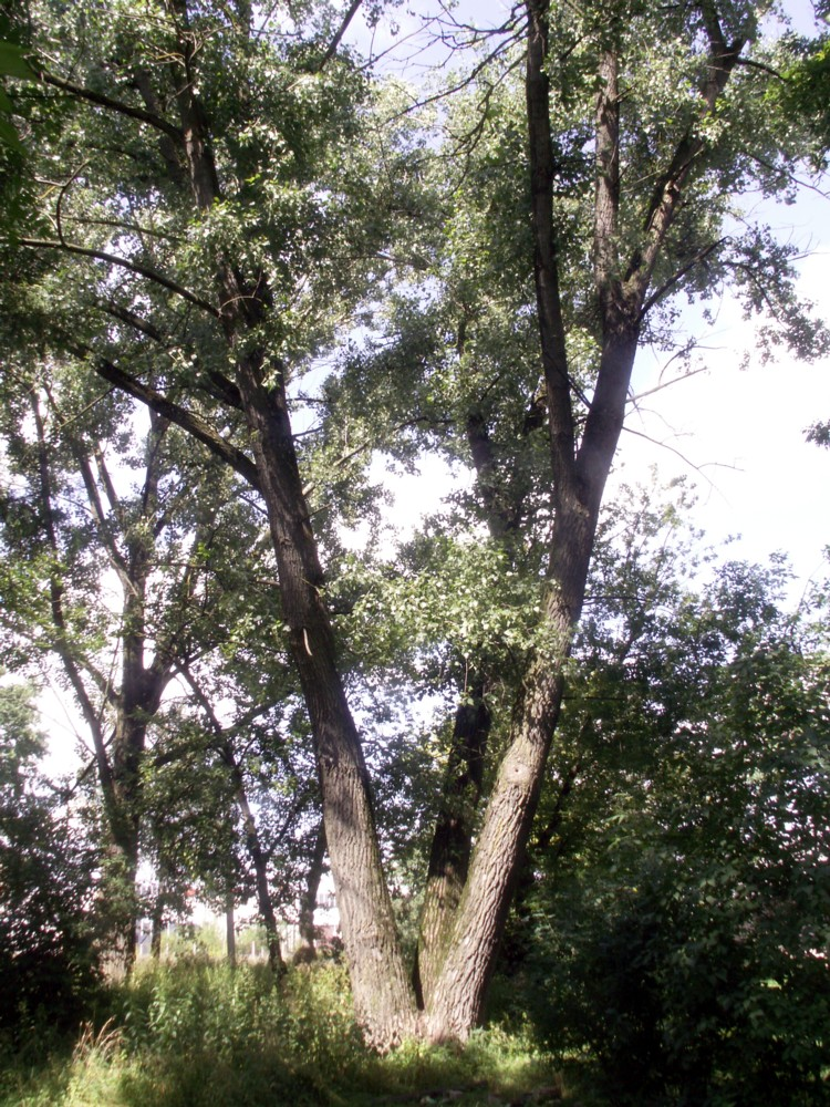 Trikamienė liepa Gubernijos parke